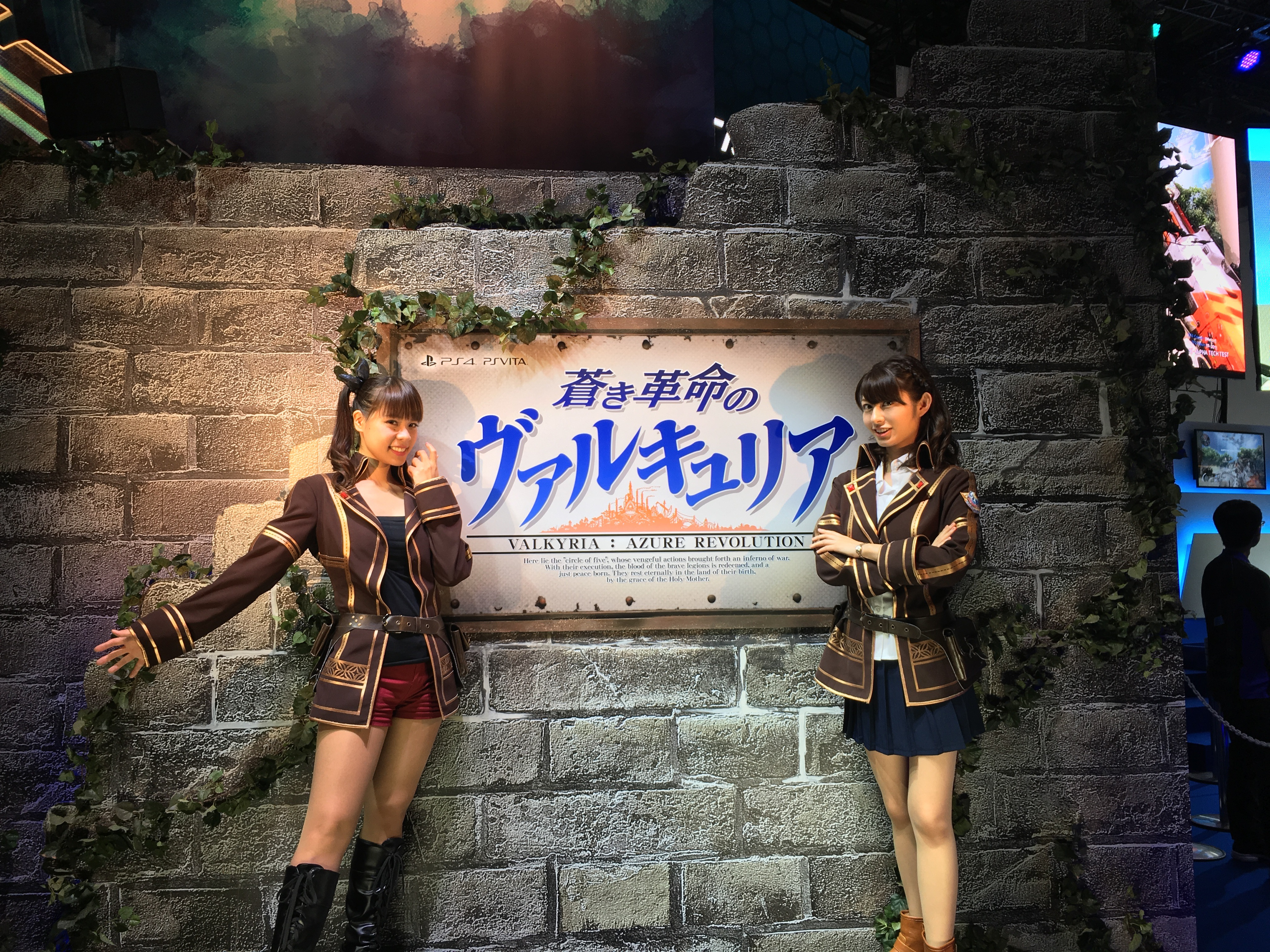 2016東京電玩展，《蒼藍革命之女武神》宣傳模特兒。